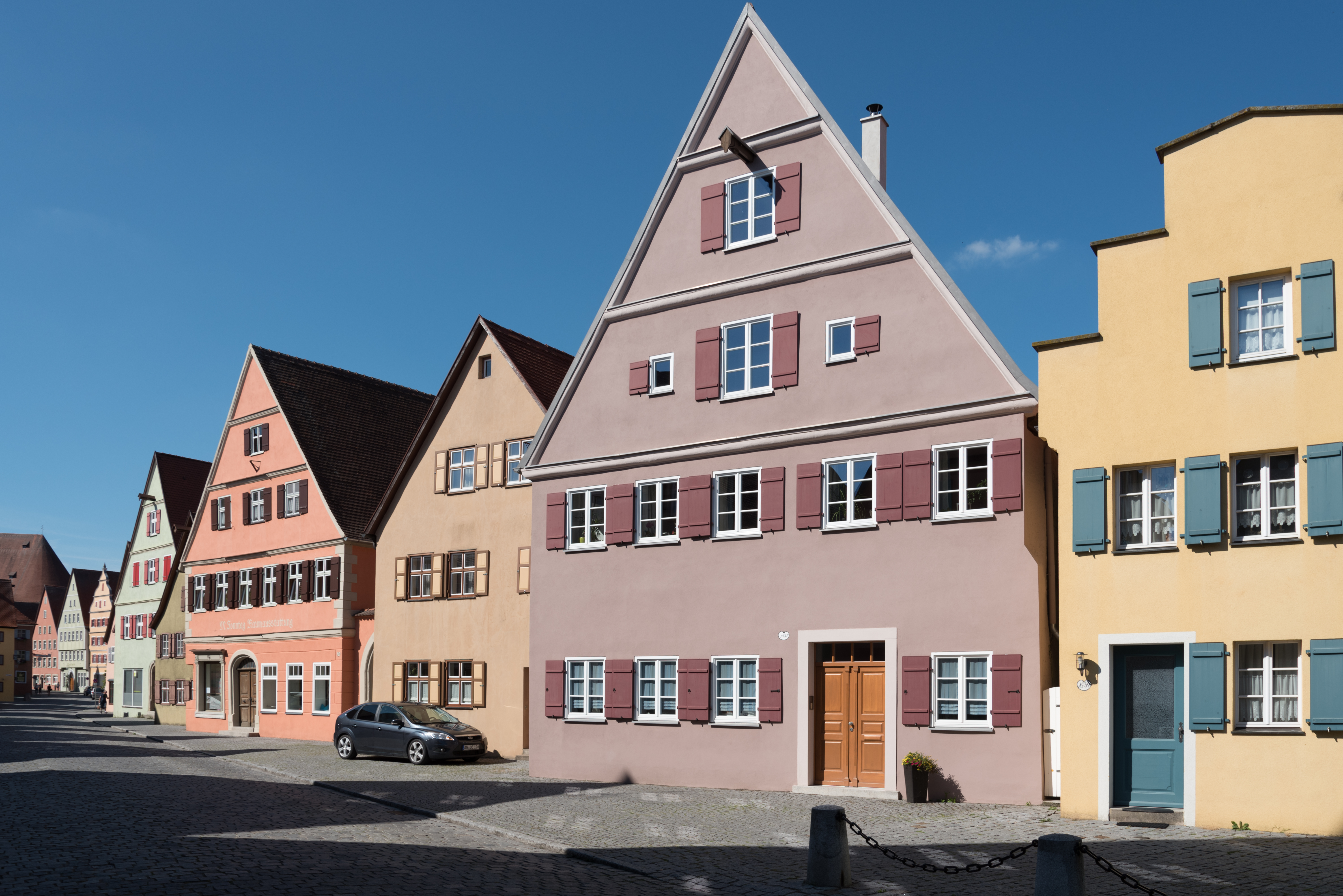 Dinkelsbühl, Nördlinger Straße 7 bis 37